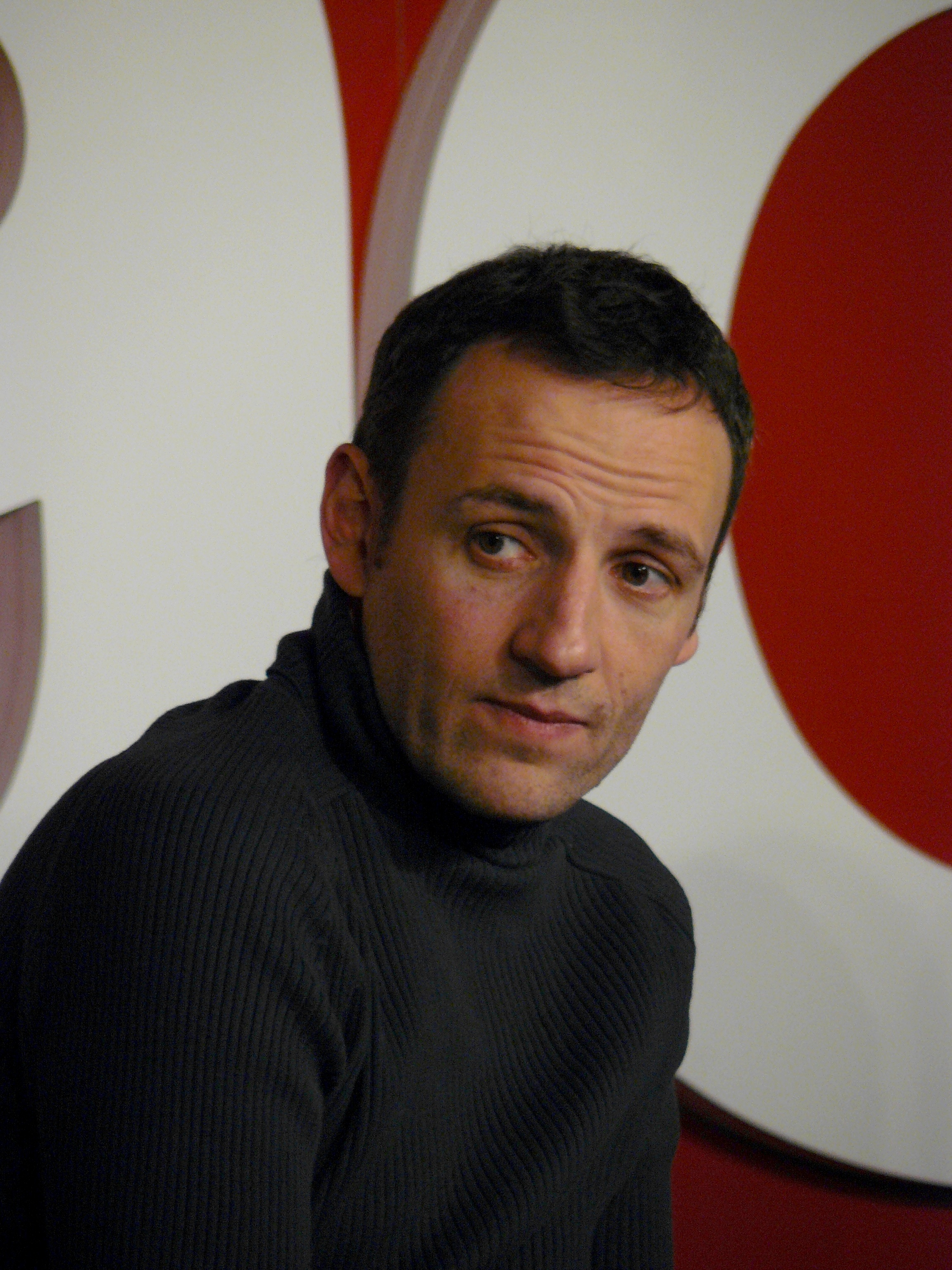 François Bégaudeau lors d'une présentation du film Entre les murs le 25 mars 2009 à la FNAC Montparnasse (Paris).